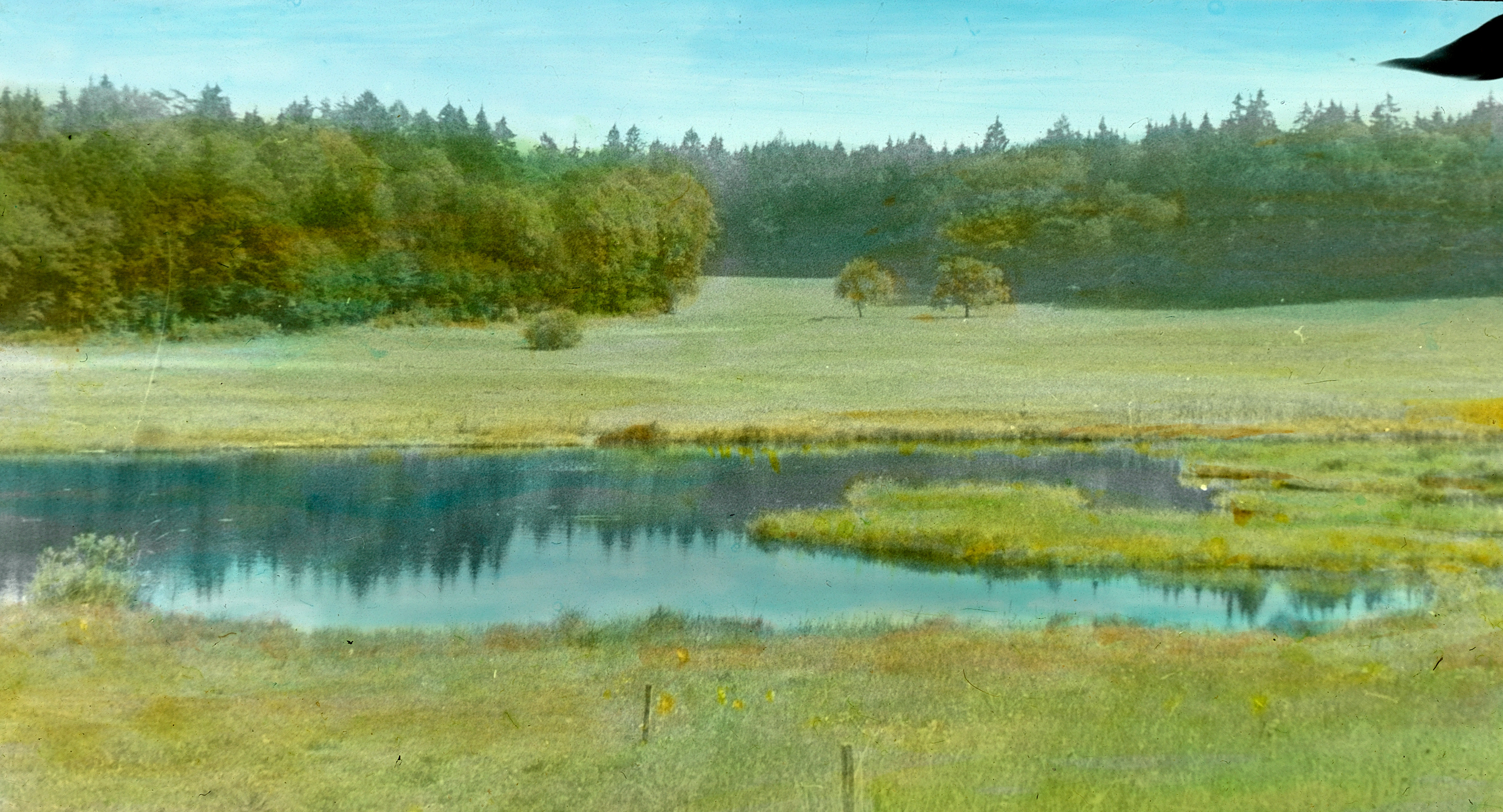 Kolorierung des Dias durch Margrit Wehrli-Frey